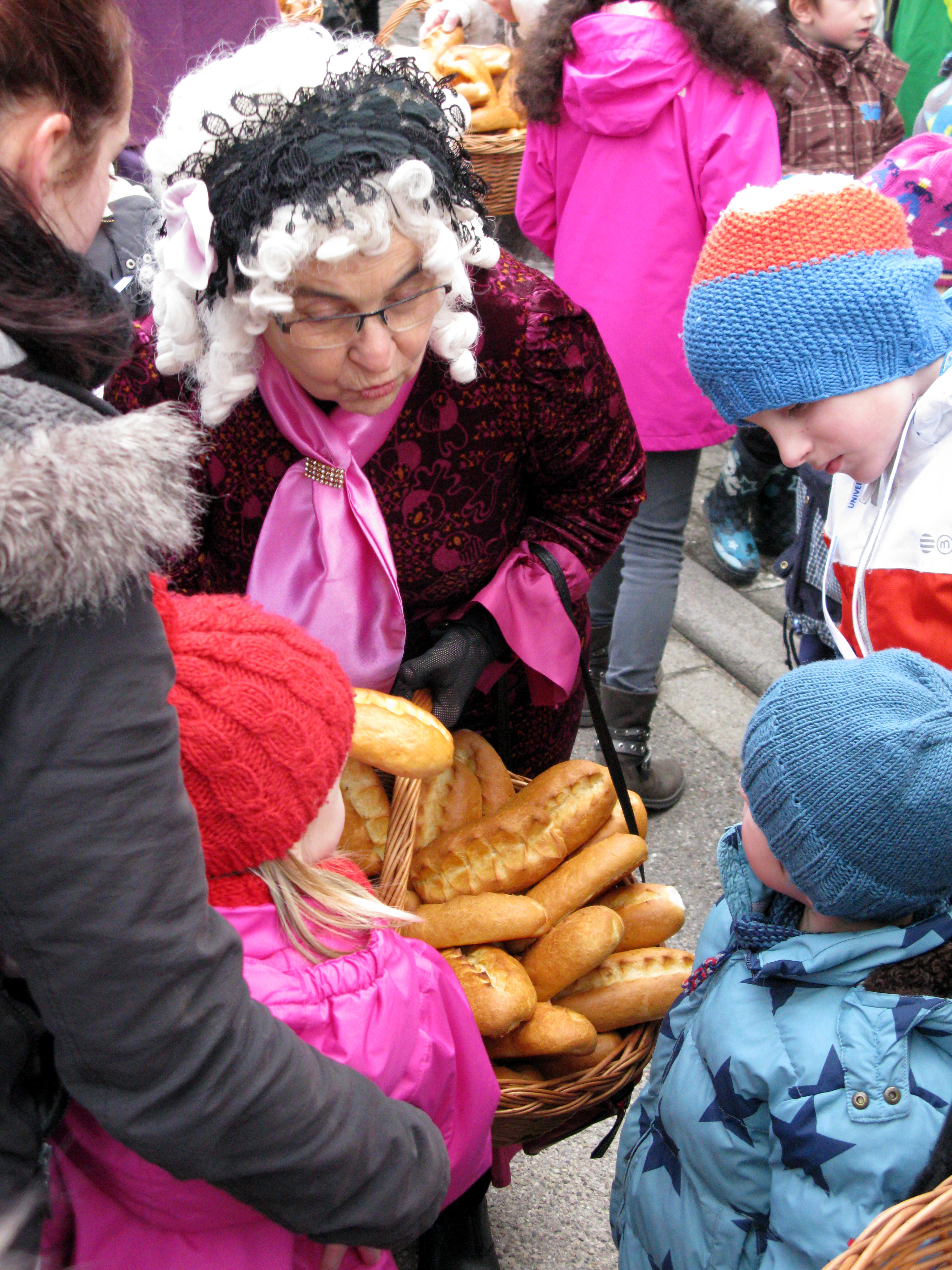 Weckensonntag in Sulzburg, Verteilung der Wecken an Kinder